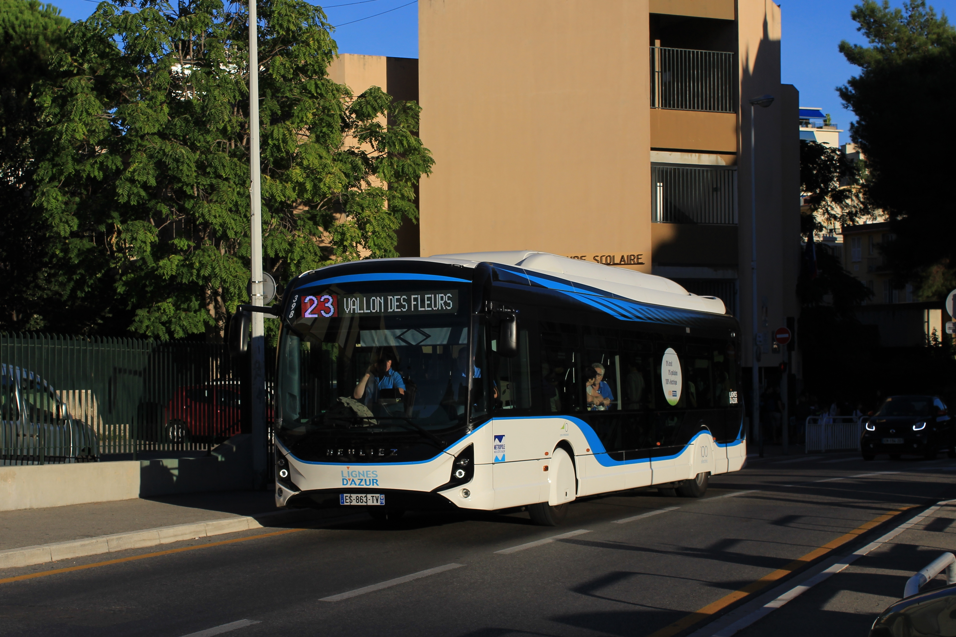 Ce GX Elec est vu lorsqu'il était testé par le réseau Lignes d'Azur sur la ligne 23